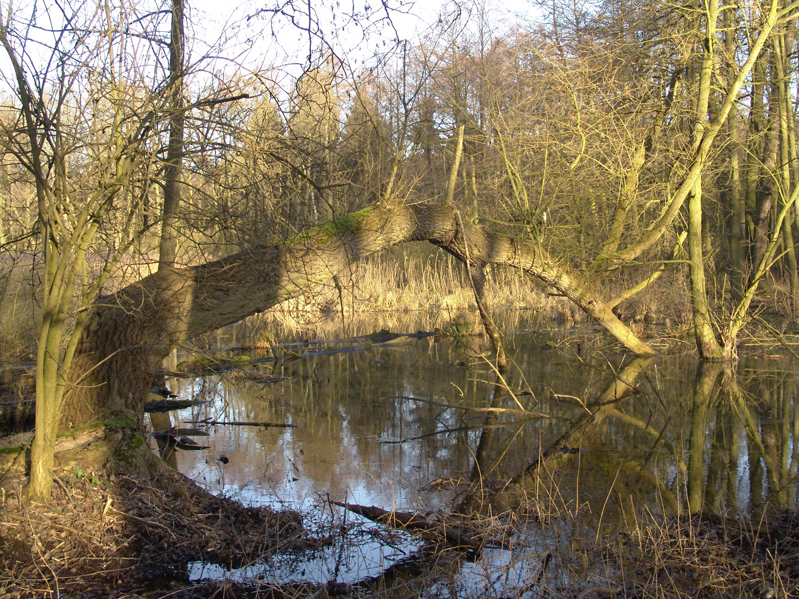 Unteres Ende des Bogensees, Blick Richtung Nordosten. Umgestürzter Baum im Vordergrund.